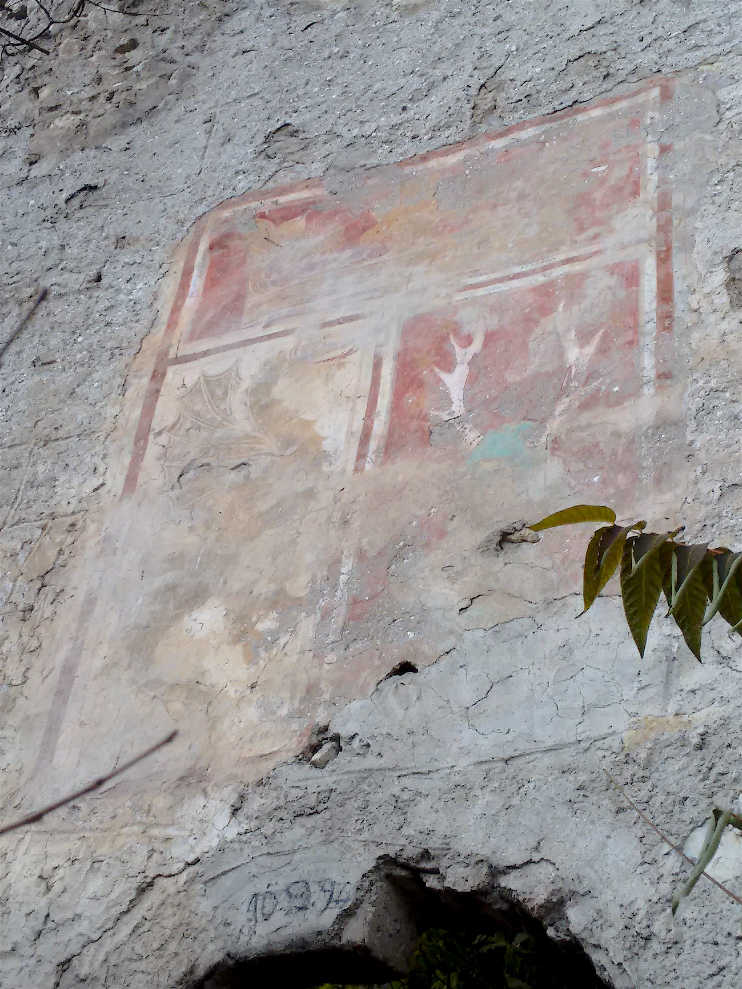 Stemma con il drago affrescato presso il portone d'ingresso del Castel San Gottardo a Mezzocorona.